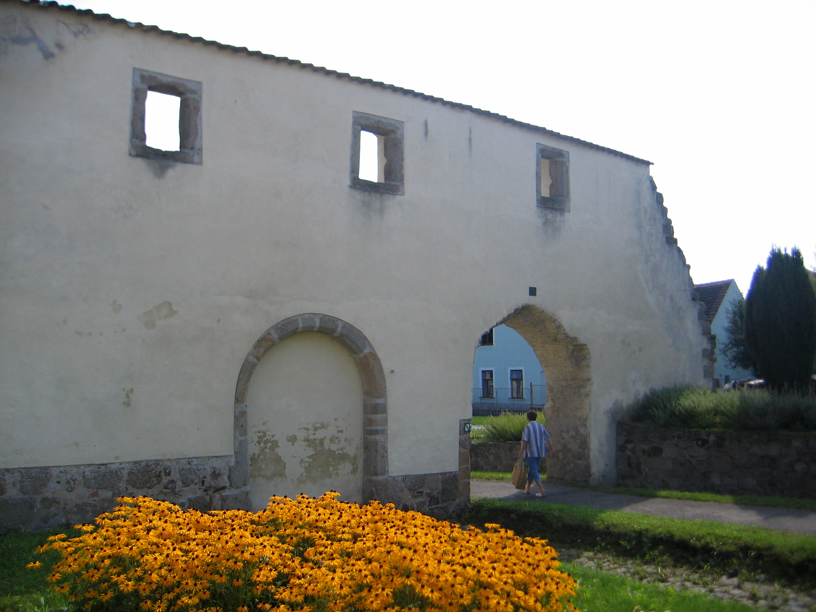 Klášter cisterciáků - fragmenty (Klášter), Klášter